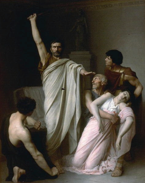 Edouard Cabane, Le serment de Brutus, Bordeaux, musée des Beaux-Arts